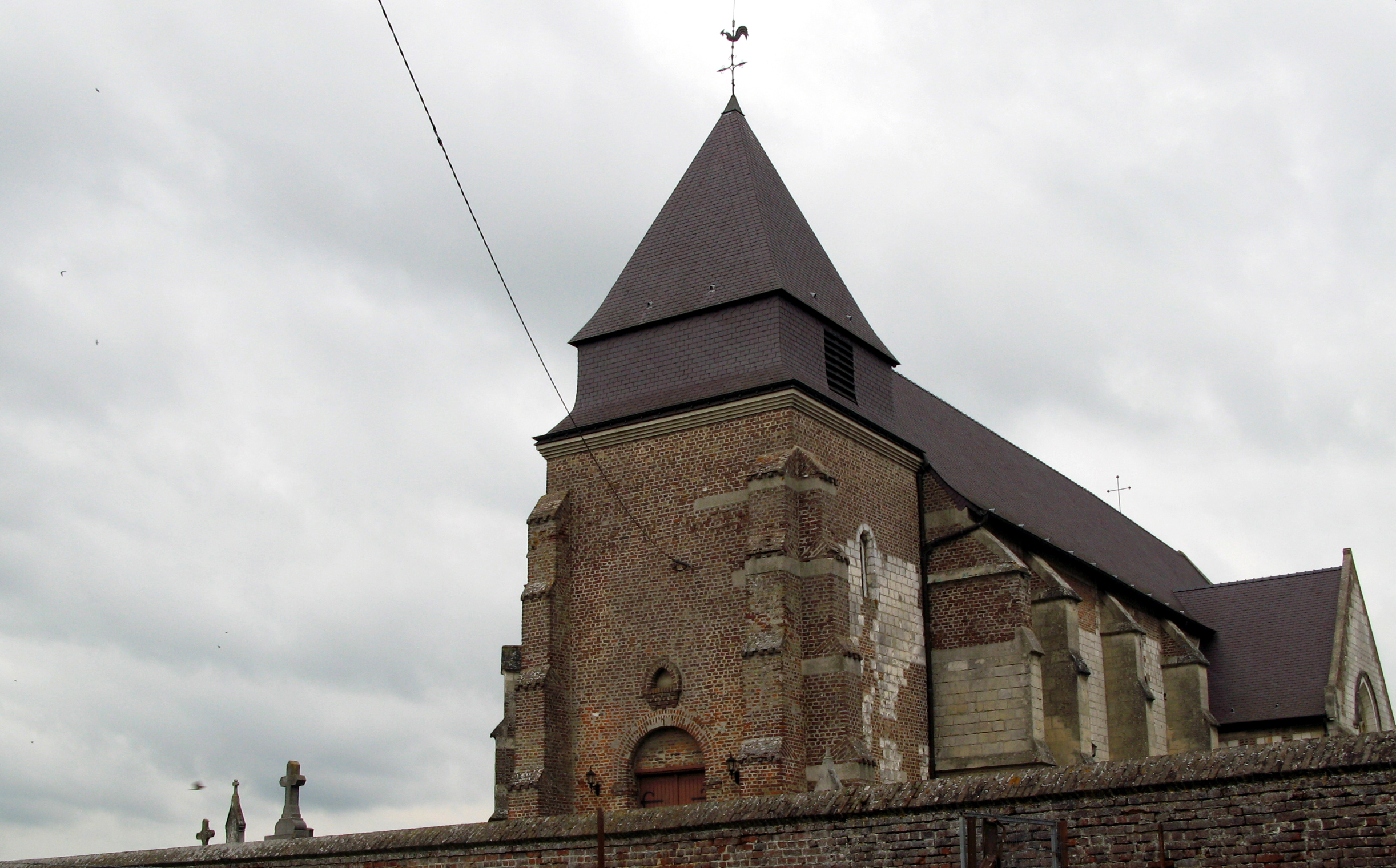 Brissay-Choigny (Aisne, France) - L'église se dresse au milieu du cimetière, qui est entouré d'un mur de briques. . .